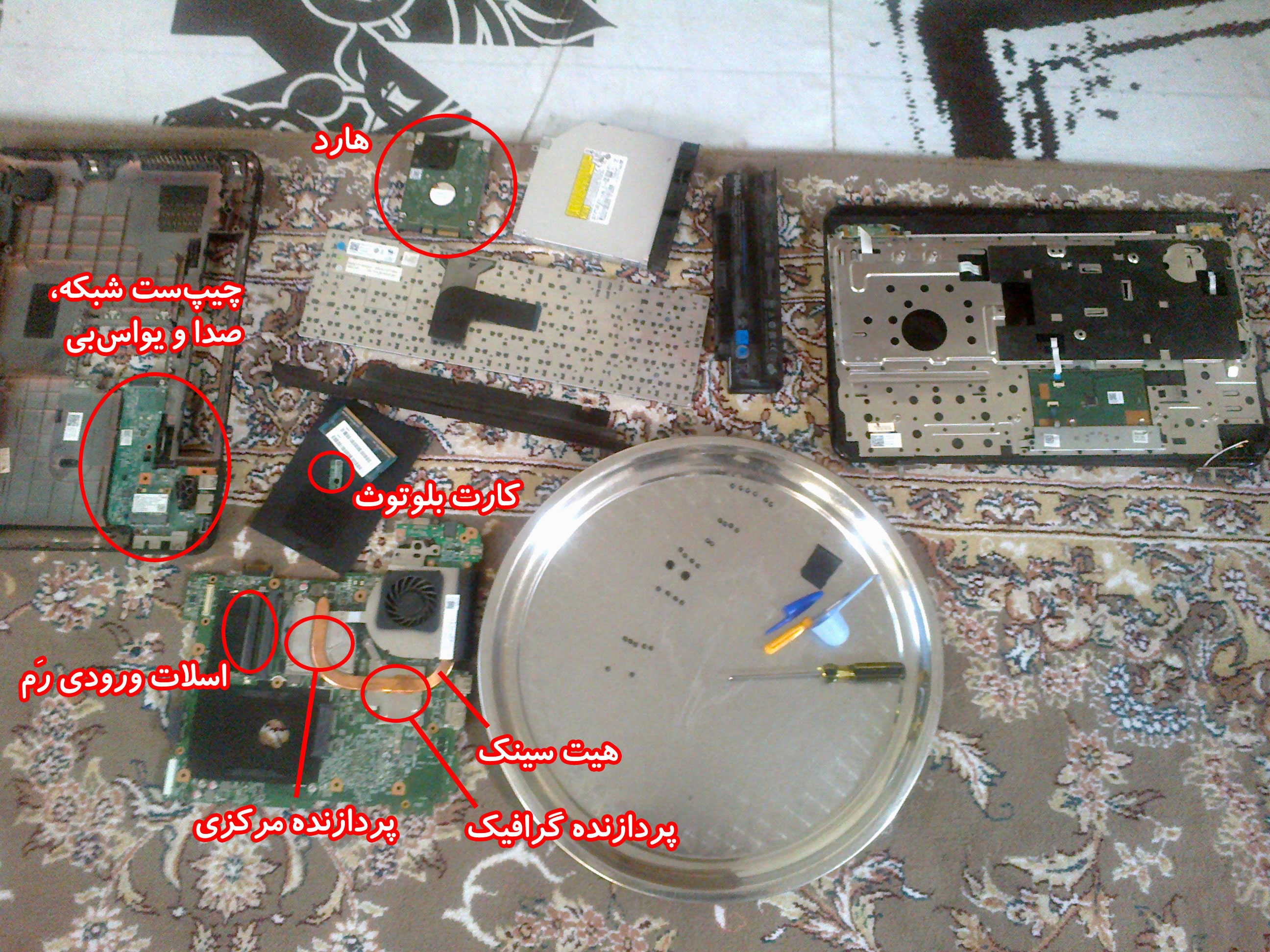 Hey you... Are you forced to make the location of CPU and GPU as inaccessible as possible? When you have to replace the thermal grease each 3 years(for new system) and once a year (for used systems)